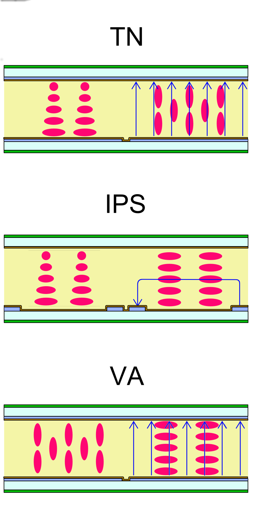 Načini preklapljanja LCD zaslonov